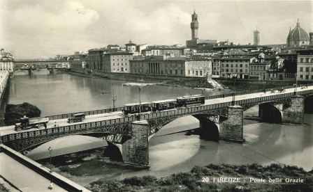 Firenze, ponte delle Grazie con tram